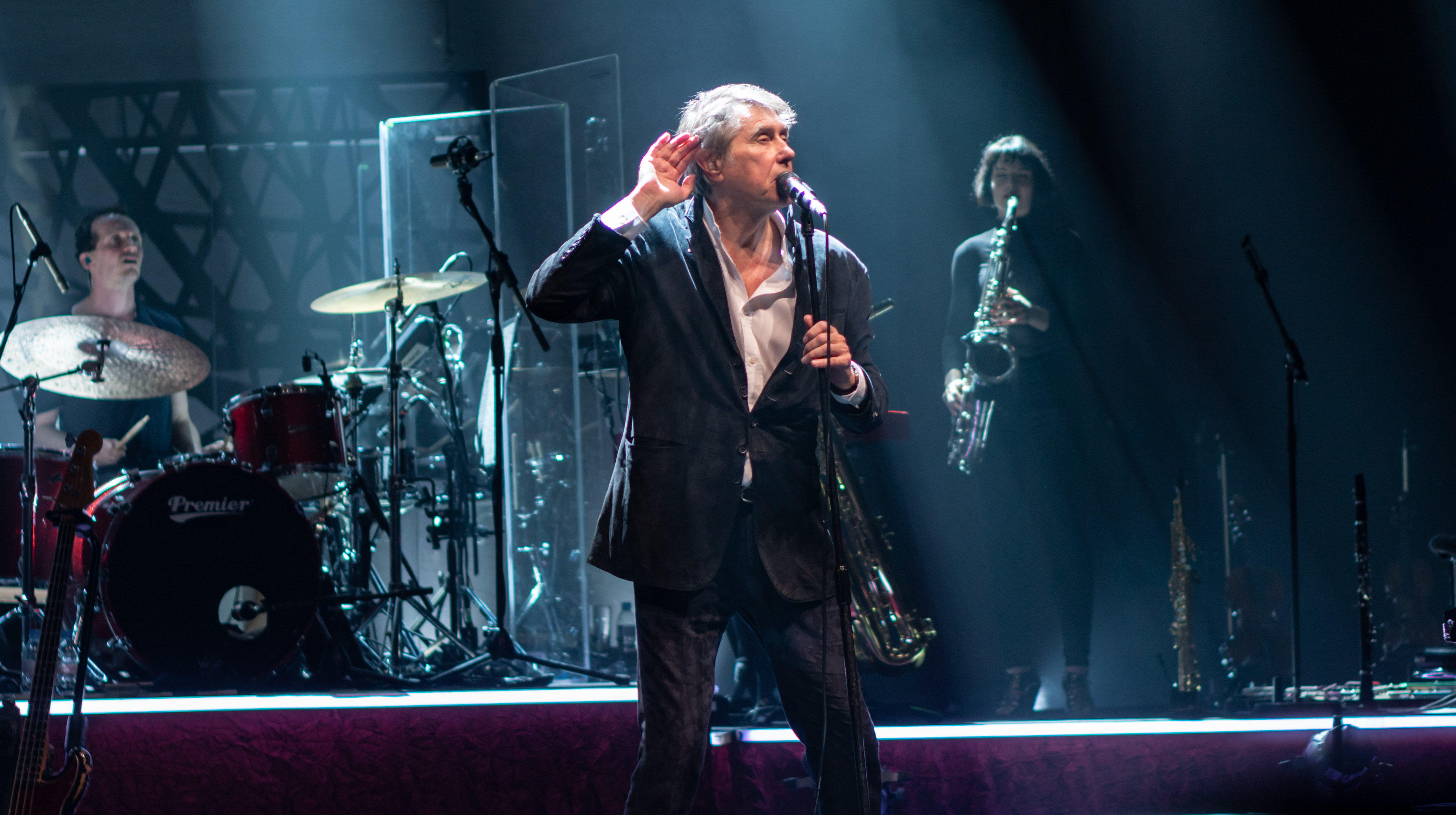 BFerryPall010518-19